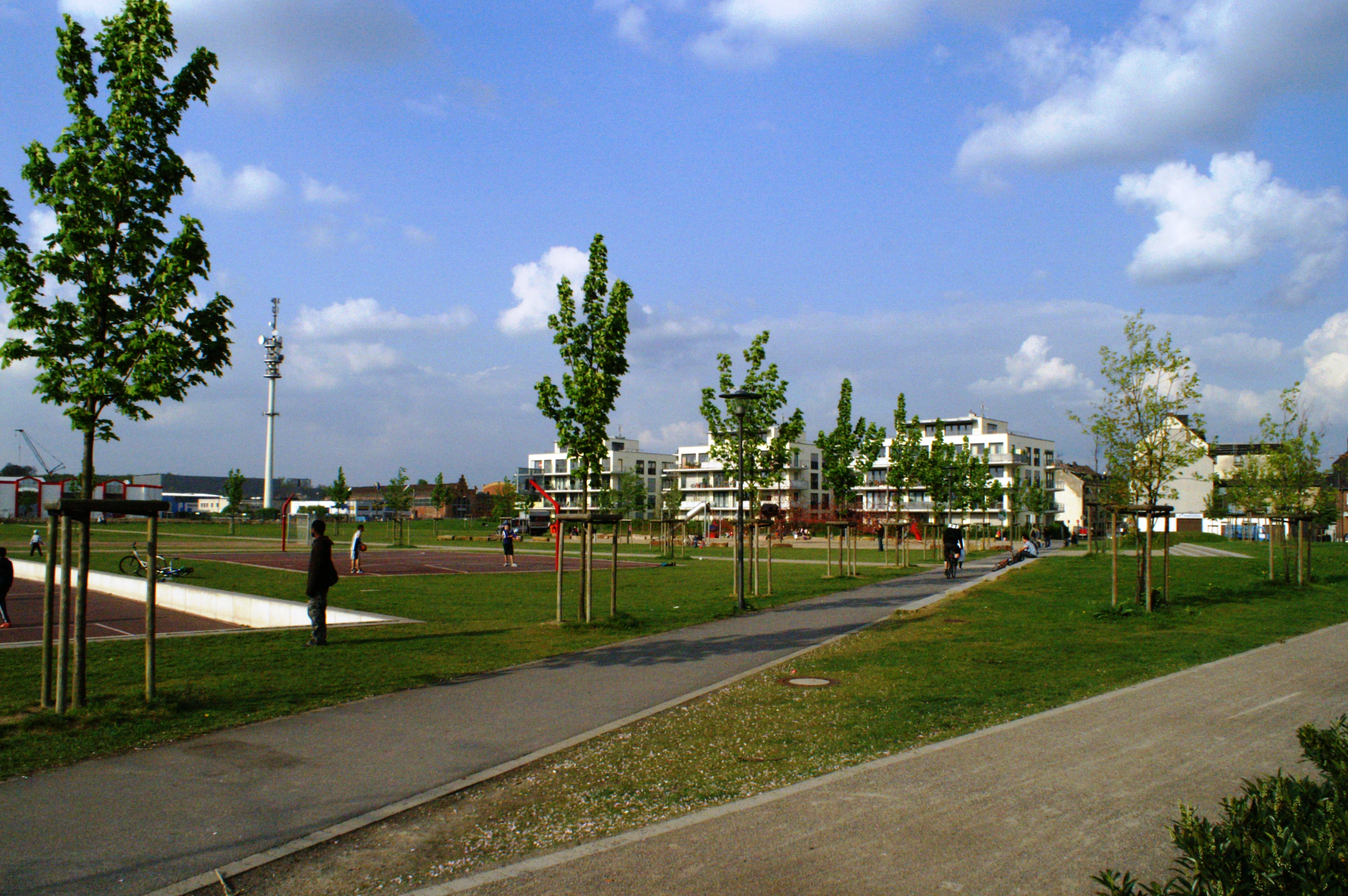 Der Bürgerpark auf dem Gelände der ehemaligen Chemischen Fabrik Kalk